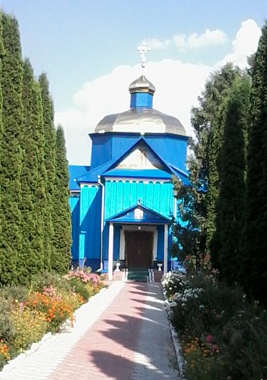 Церква Воздвиження Чесного Хреста у с. Новий Олексинець